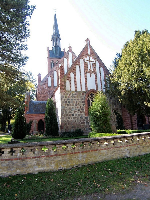 Kirche in Basedow